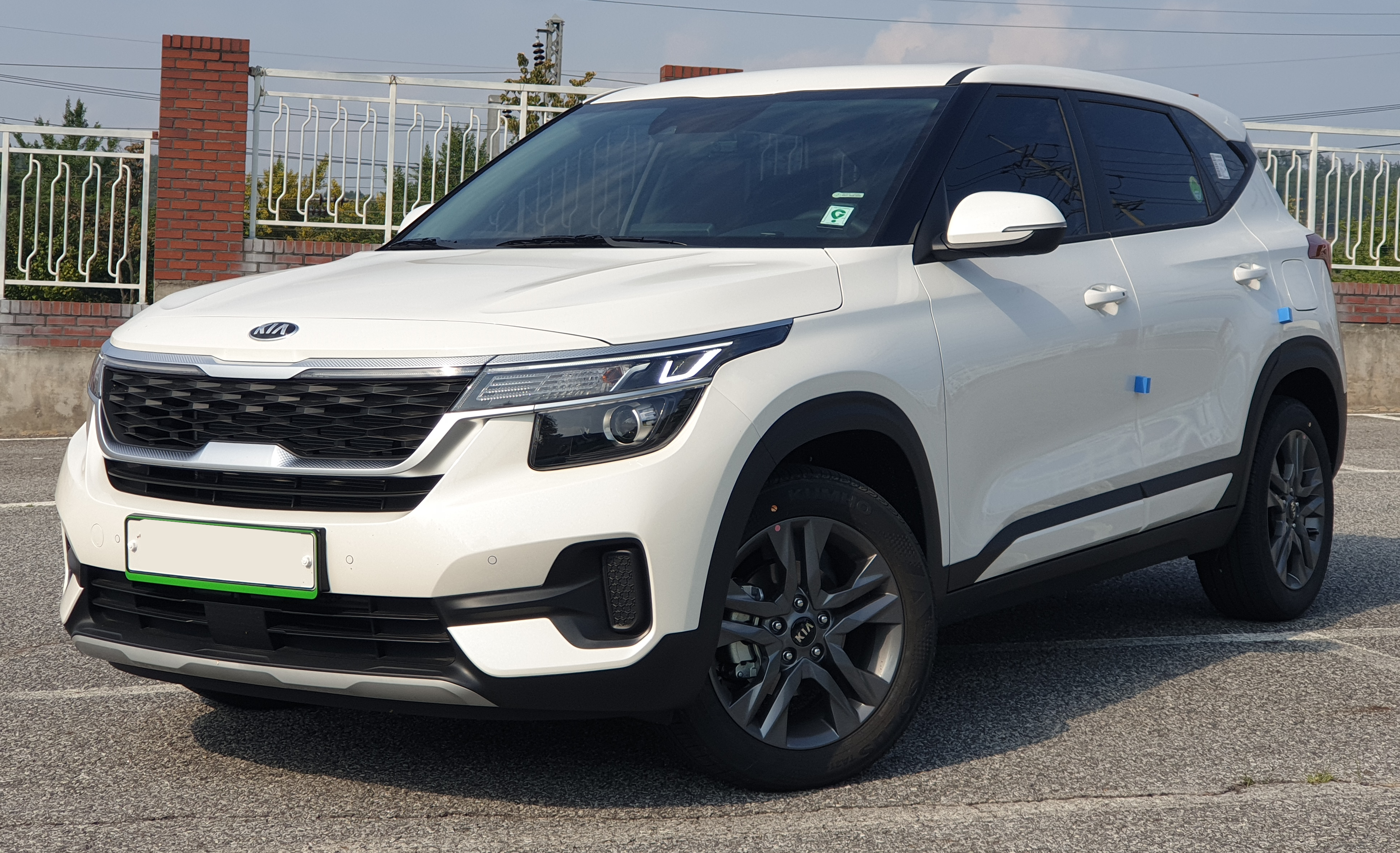 기아 셀토스